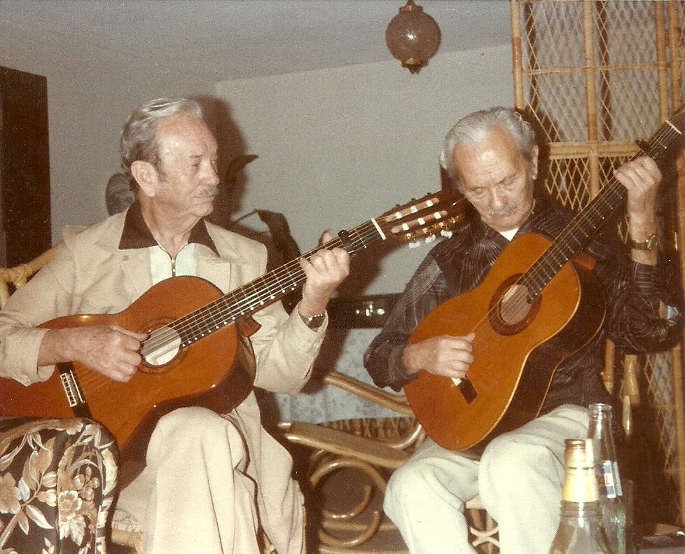 Chalín Cámara (der) y su hermano Fausto, tocando en duo